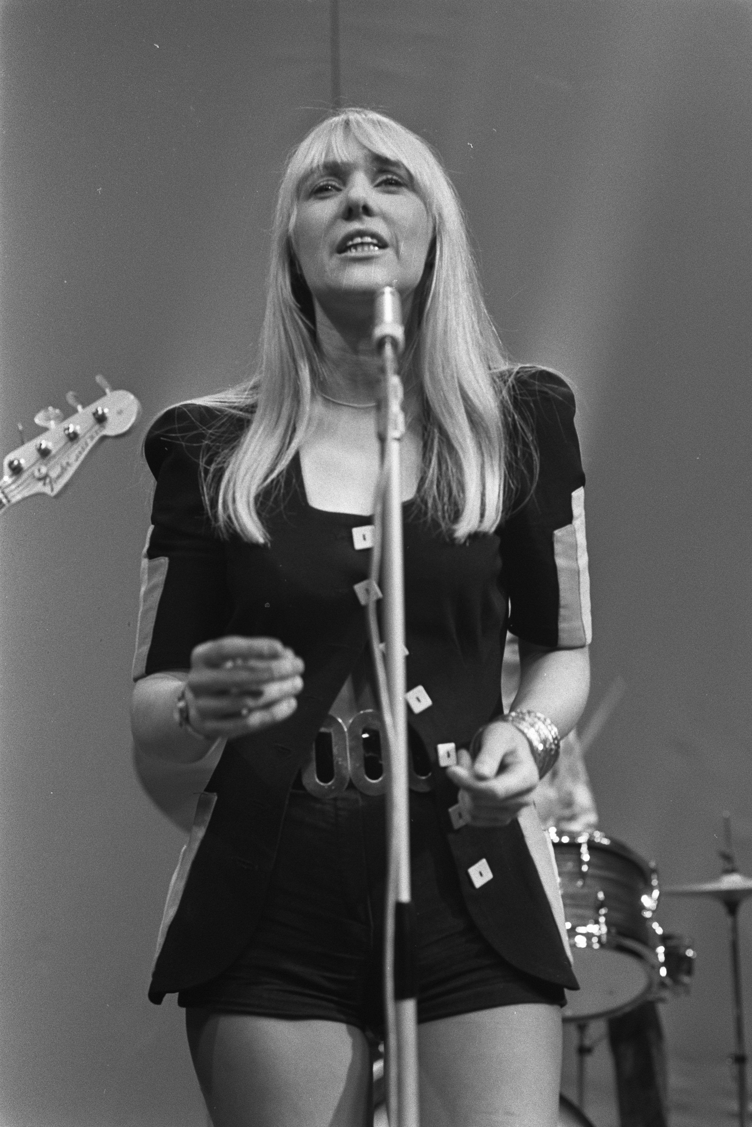 Sally Carr van Middle Of The Road tijdens een optreden voor het televisieprogramma TopPop.